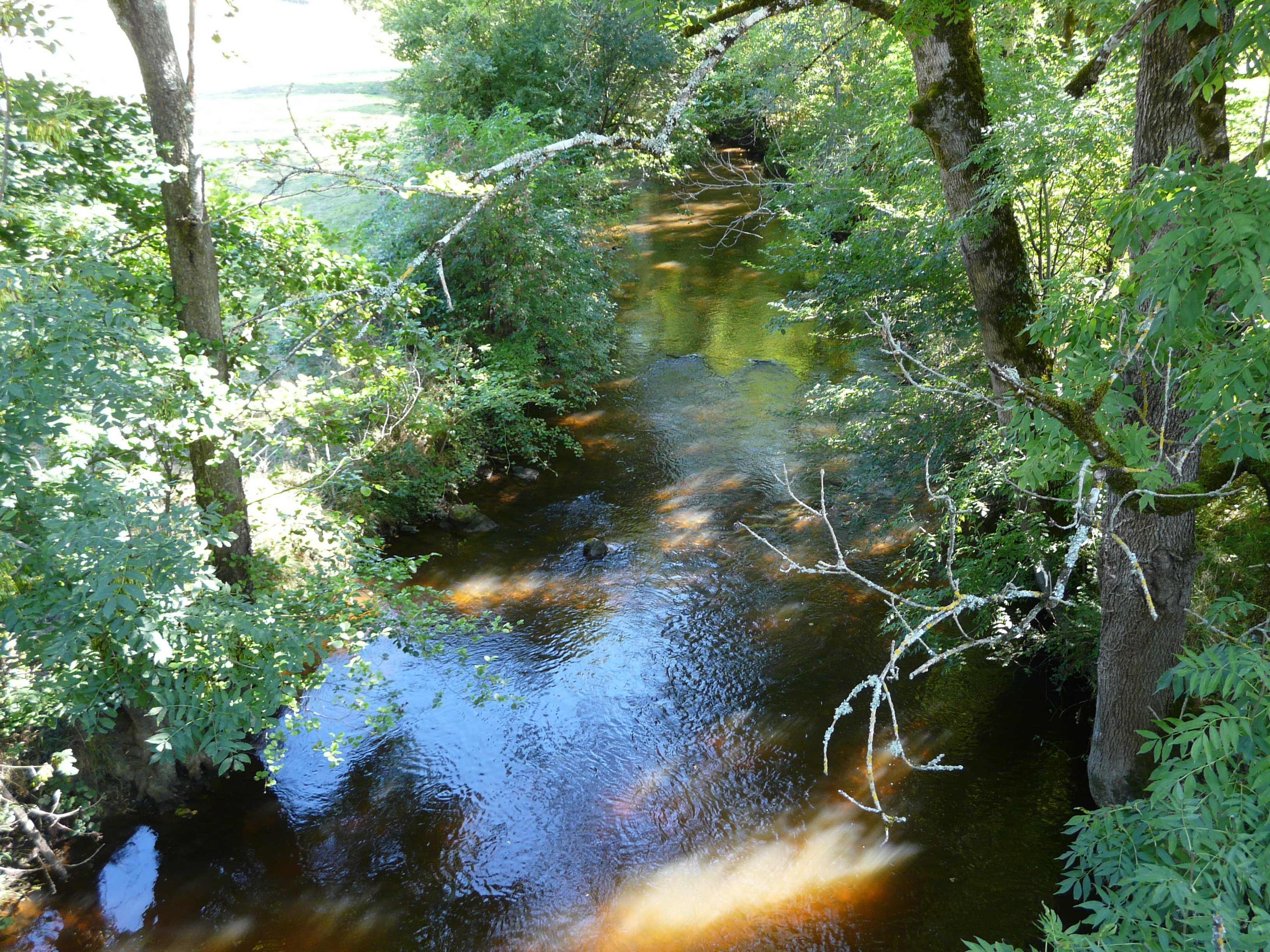 La Côle à Saint-Romain-et-Saint-Clément, Dordogne, France. Vue prise en direction de l'amont.